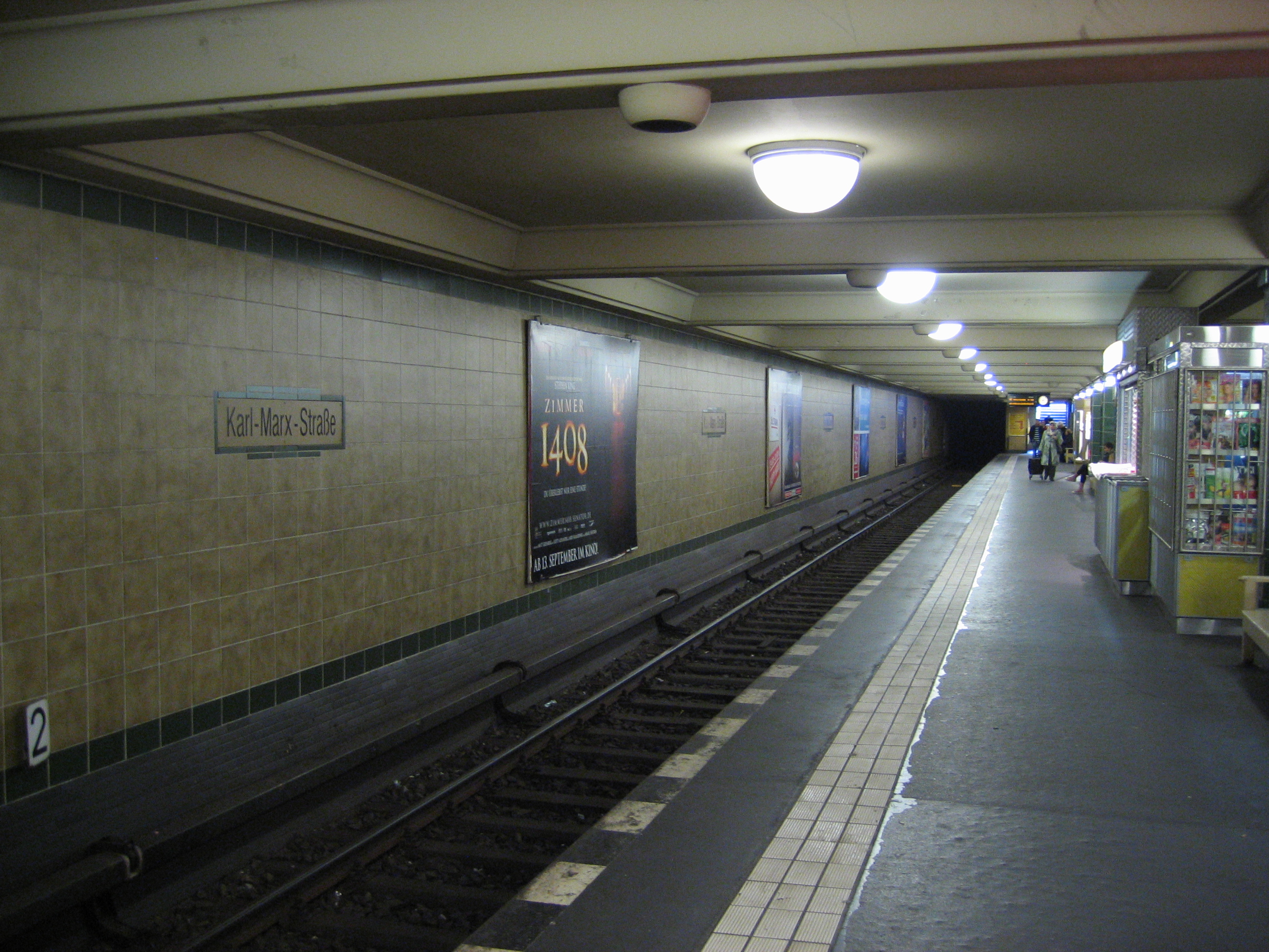 U-Bahnhof Karl-Marx-Straße, Berlin